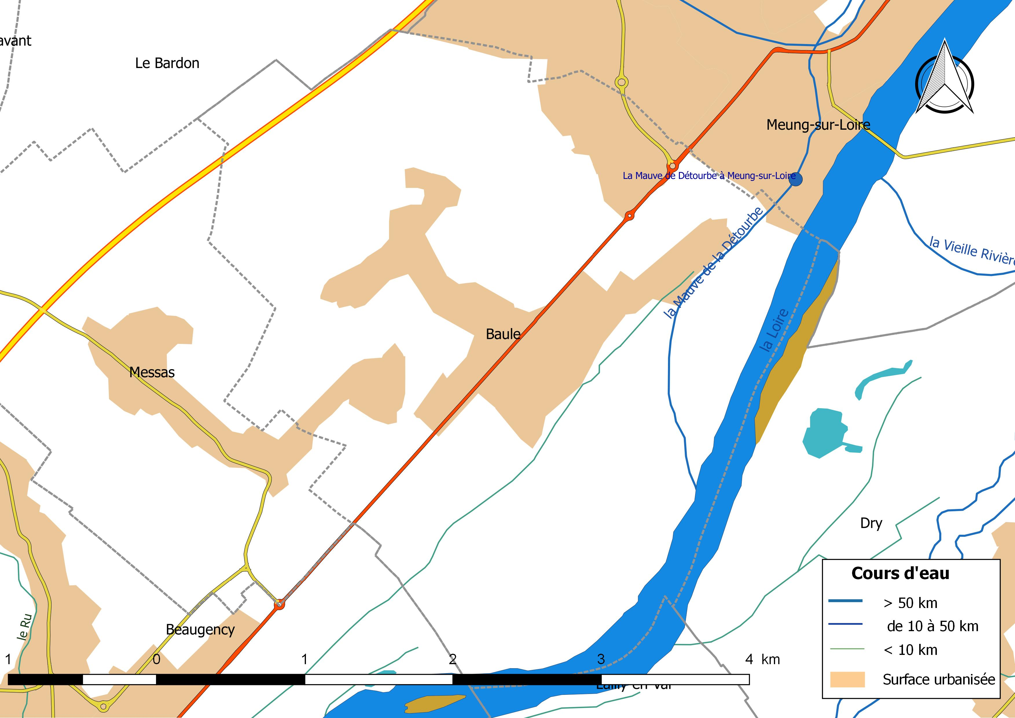 Carte du réseau hydrographique de la commune de Baule (France).